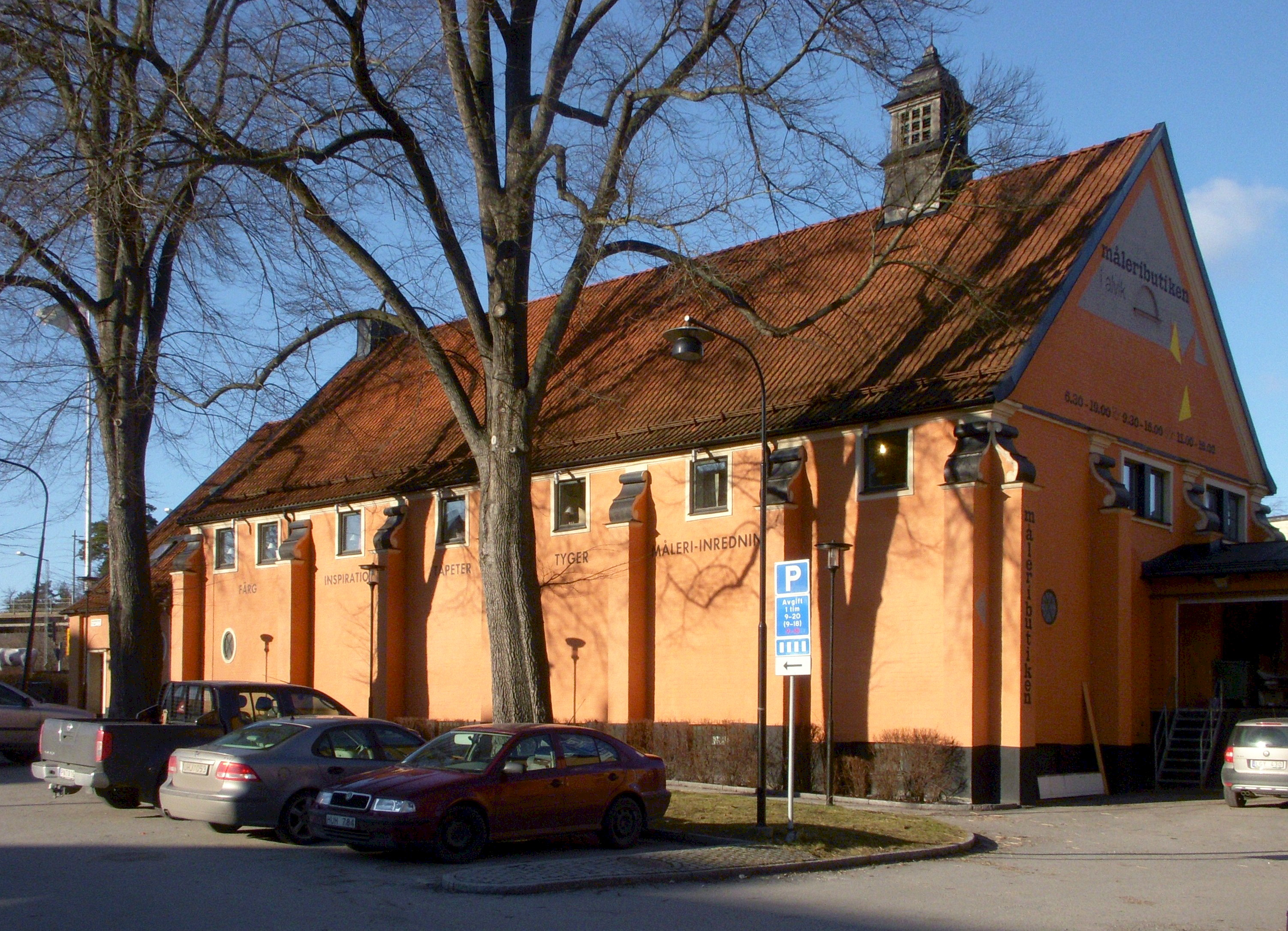 Före detta Bromma-Teatern vid Alvik i Bromma, arkitekt Gustaf E. Petterson (1855-1933). Bromma-Teatern byggdes 1921-1922. Första föreställningen gavs den 27 september 1921. Biografen stängde 1971. Numera finns Måleributiken i Alvik AB i byggnaden på Drottningholmsvägen 175.